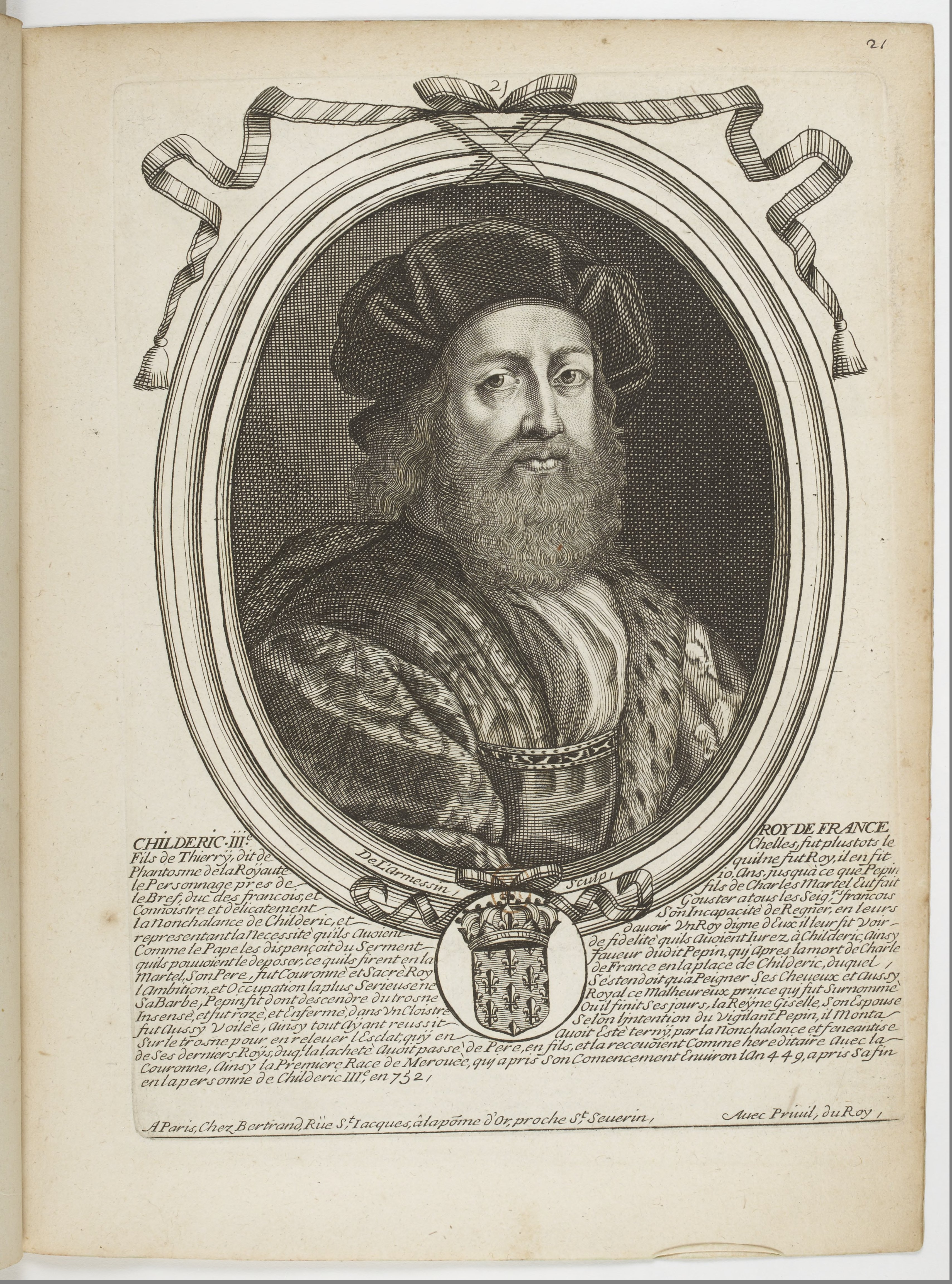 Les augustes représentations de tous les rois de France, depuis Pharamond jusqu'à Louis XIV,... avec un abrégé historique sous chacun, contenant leurs naissances, inclinations et actions plus remarquables pendant leurs règnes